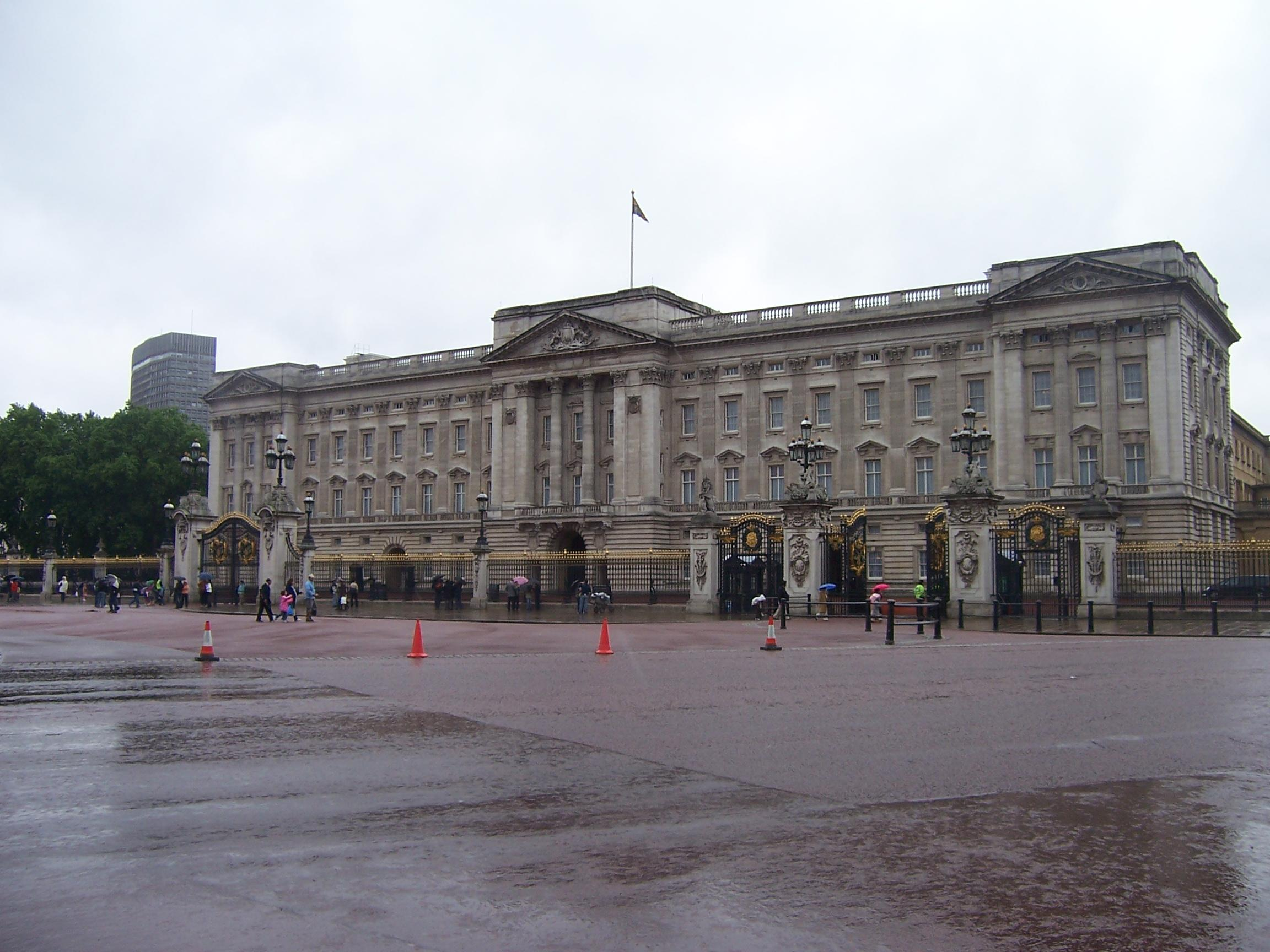 Buckingham Palace op een natte dag